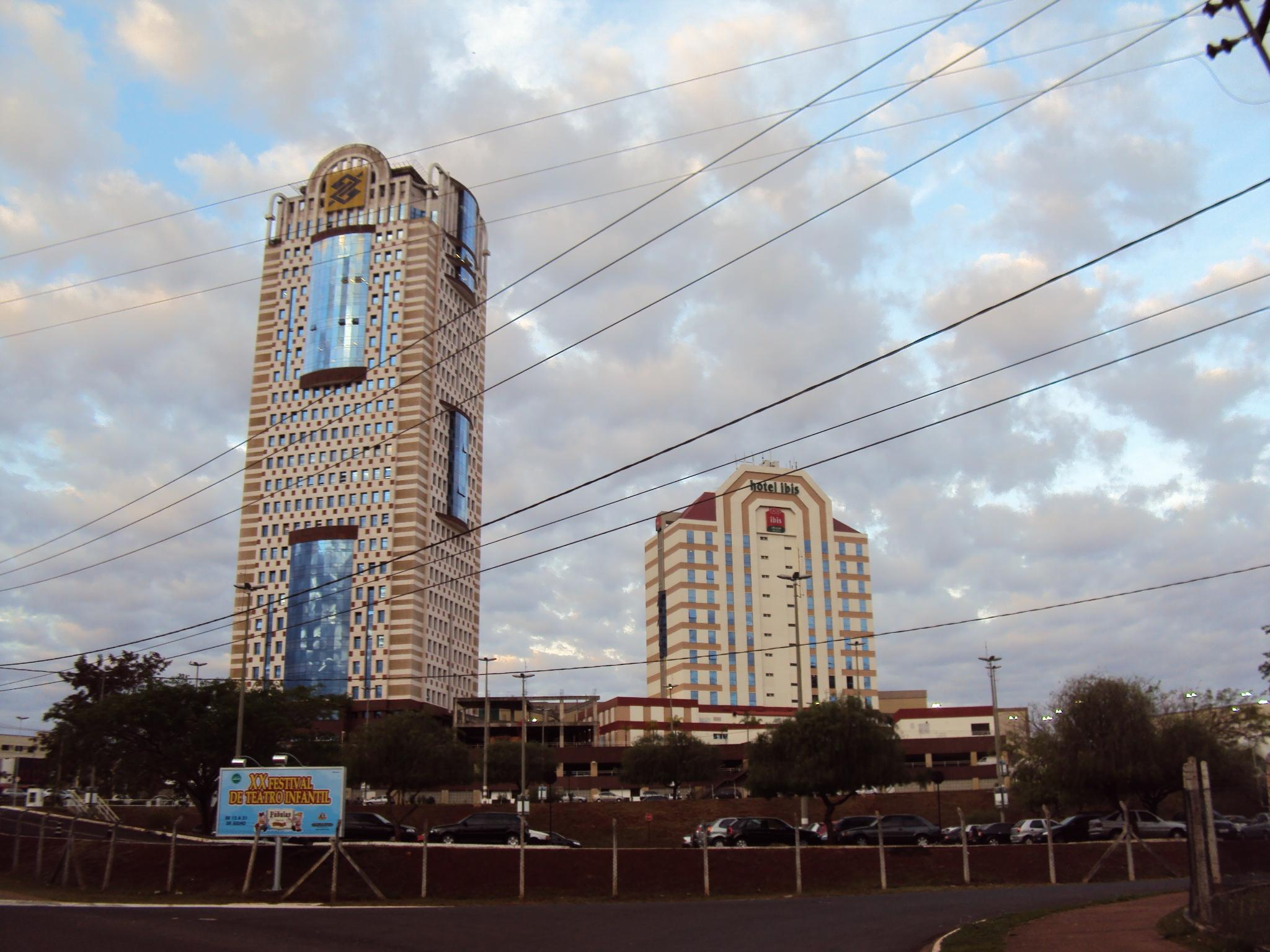 Centro Empresarial Ribeirão office Tower - Ribeirão Shopping- e Hotel Ibis